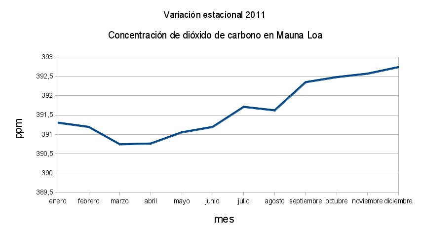 Variación estacional de la concentración de dióxido de carbono en 2011 medido en Mauna Loa, Hawai.